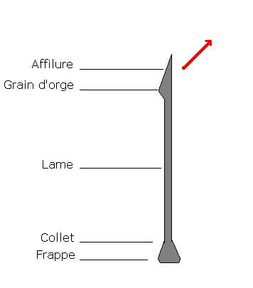 Schéma d'un clou à ferrer, importé par l'auteur du schéma